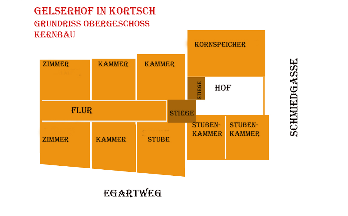 Grundriss des Gelserhofs in Kortsch